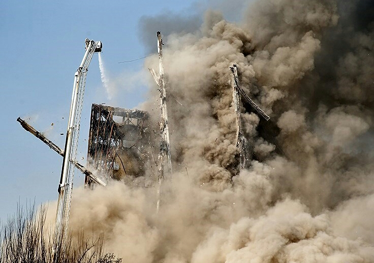 لحظه فرو ریختن ساختمان پلاسکو، تهران، ۳۰ دی ۱۳۹۵